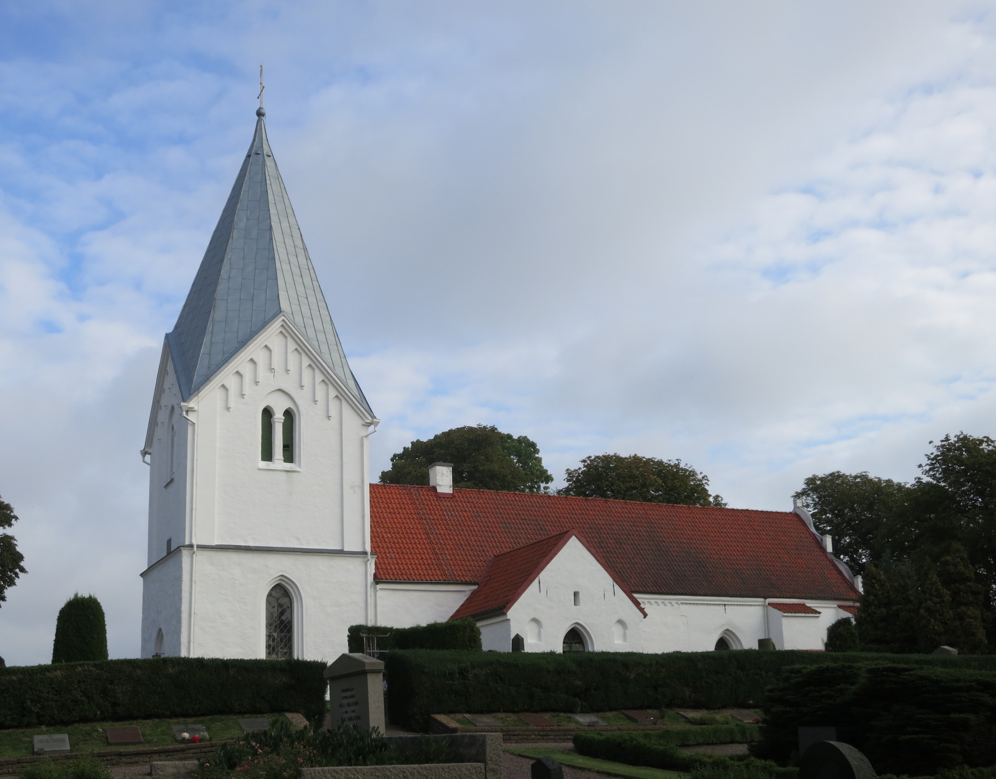 Västra Ingelstads kyrka (Ingelstad 29:1)